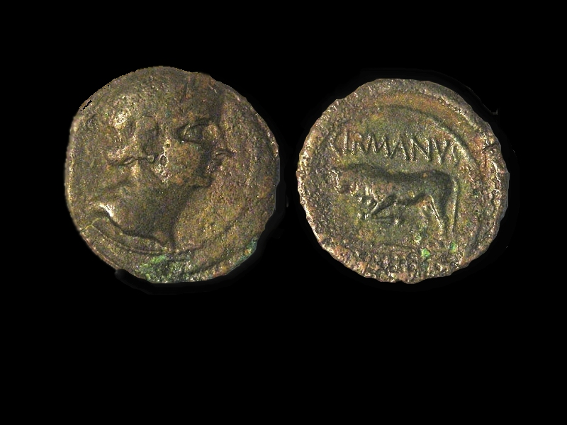 Bronze GERMANVS INDVTILLI au taureau (Quadrans) c. 10 AC.